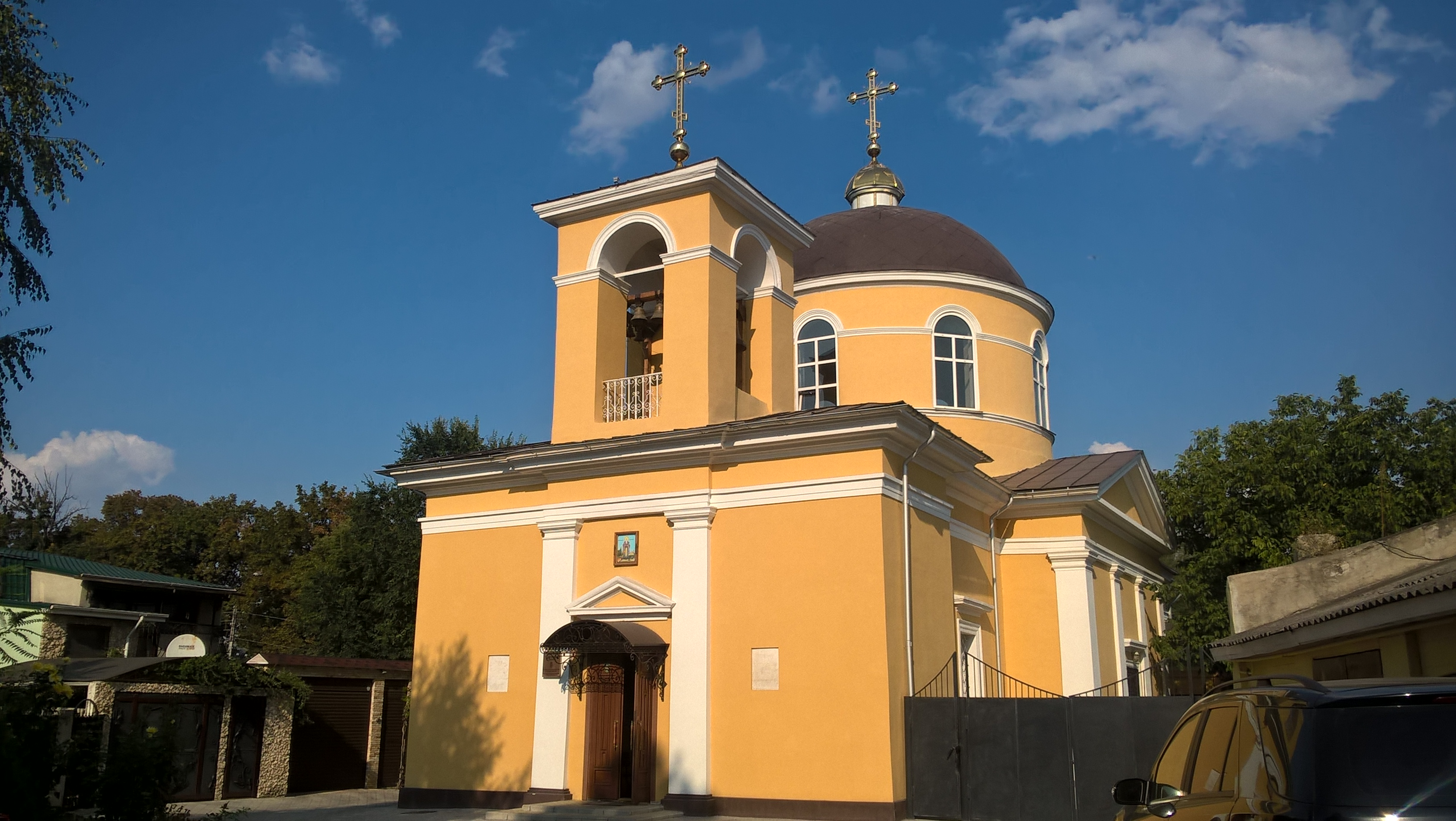 Cerkiew św. Haralampiusza w Kiszyniowie